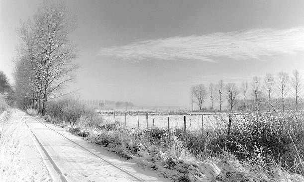 Drömling im Winter Foto aufgenommen von Benutzer Benutzer:Axel Hindemith, Januar 1986